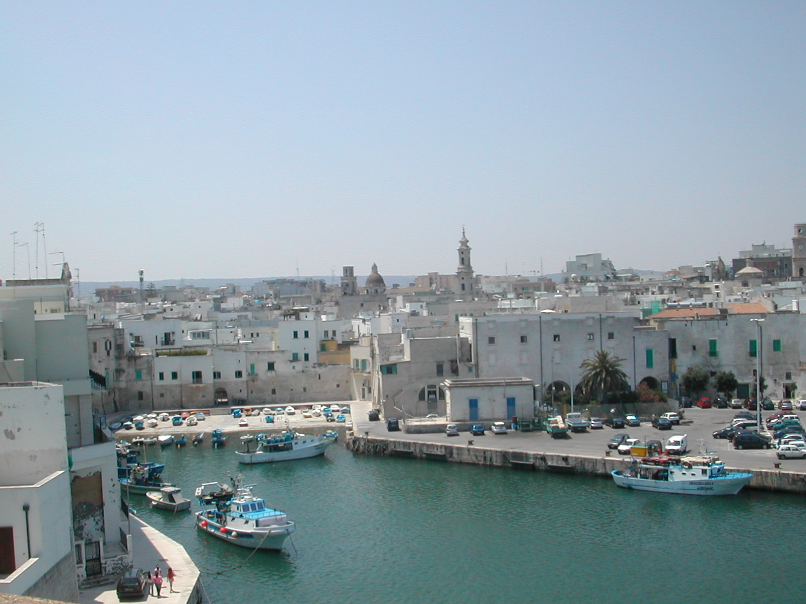 vista dagli spalti del castello Carlo V di Monopoli (BA) della "Caserma spagnola" costruita a spese della cittadinanza nel XVI secolo per l'alloggio dei soldati spagnoli, evitando così il gravoso inconveniente di accoglierli nelle abitazioni private.